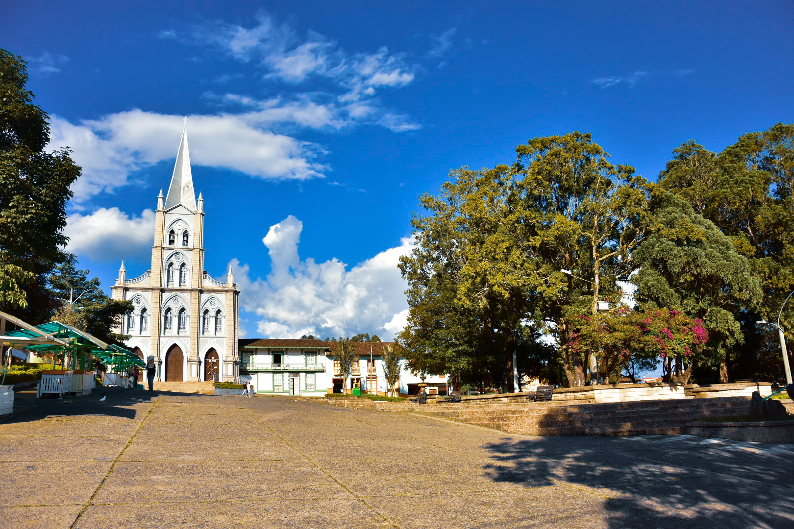 Parque De Caramanta - Antioquia